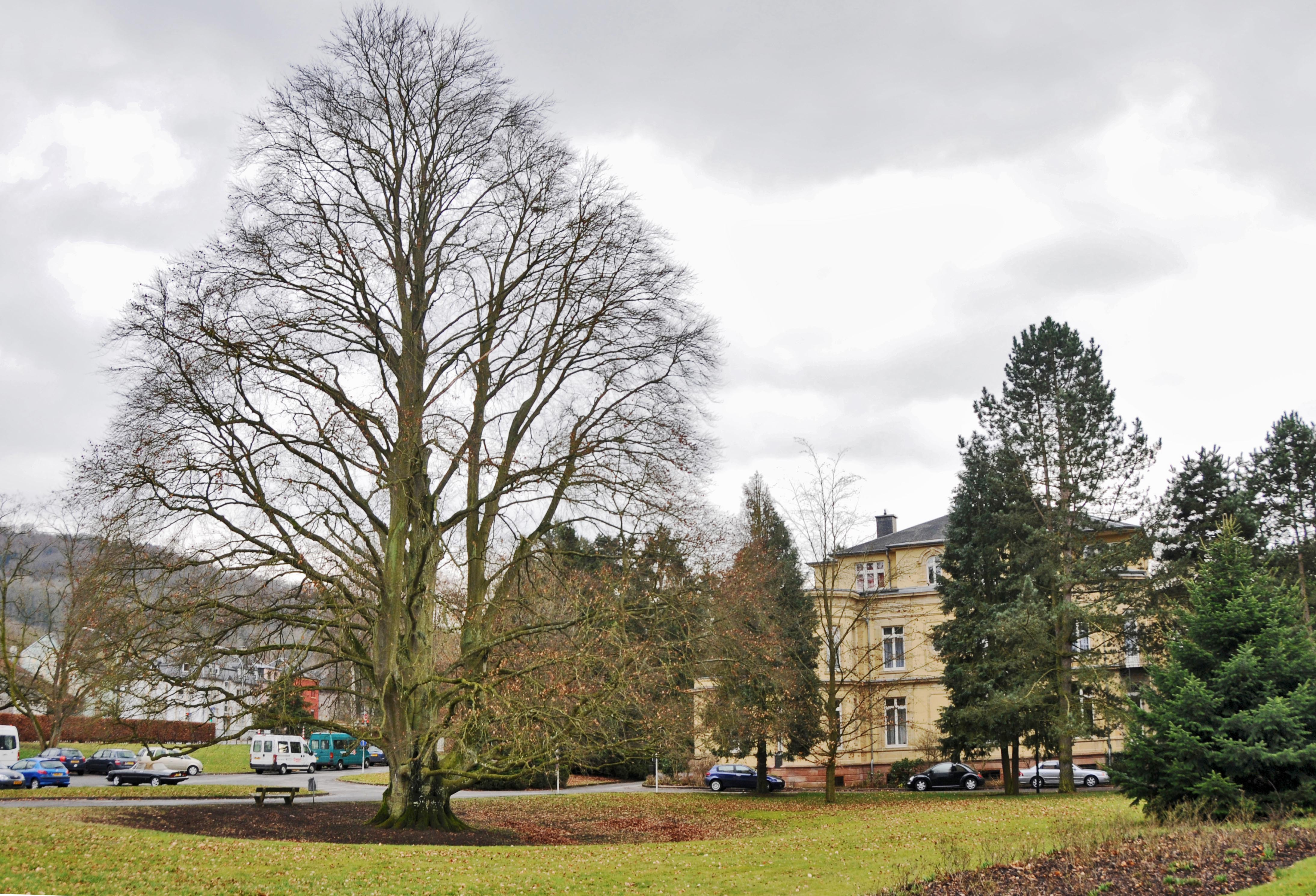 Park zu Bouferdeng. Kategorie:Bemierkenswäert Beem zu Lëtzebuerg + Kategorie:Gemeng Luerenzweiler